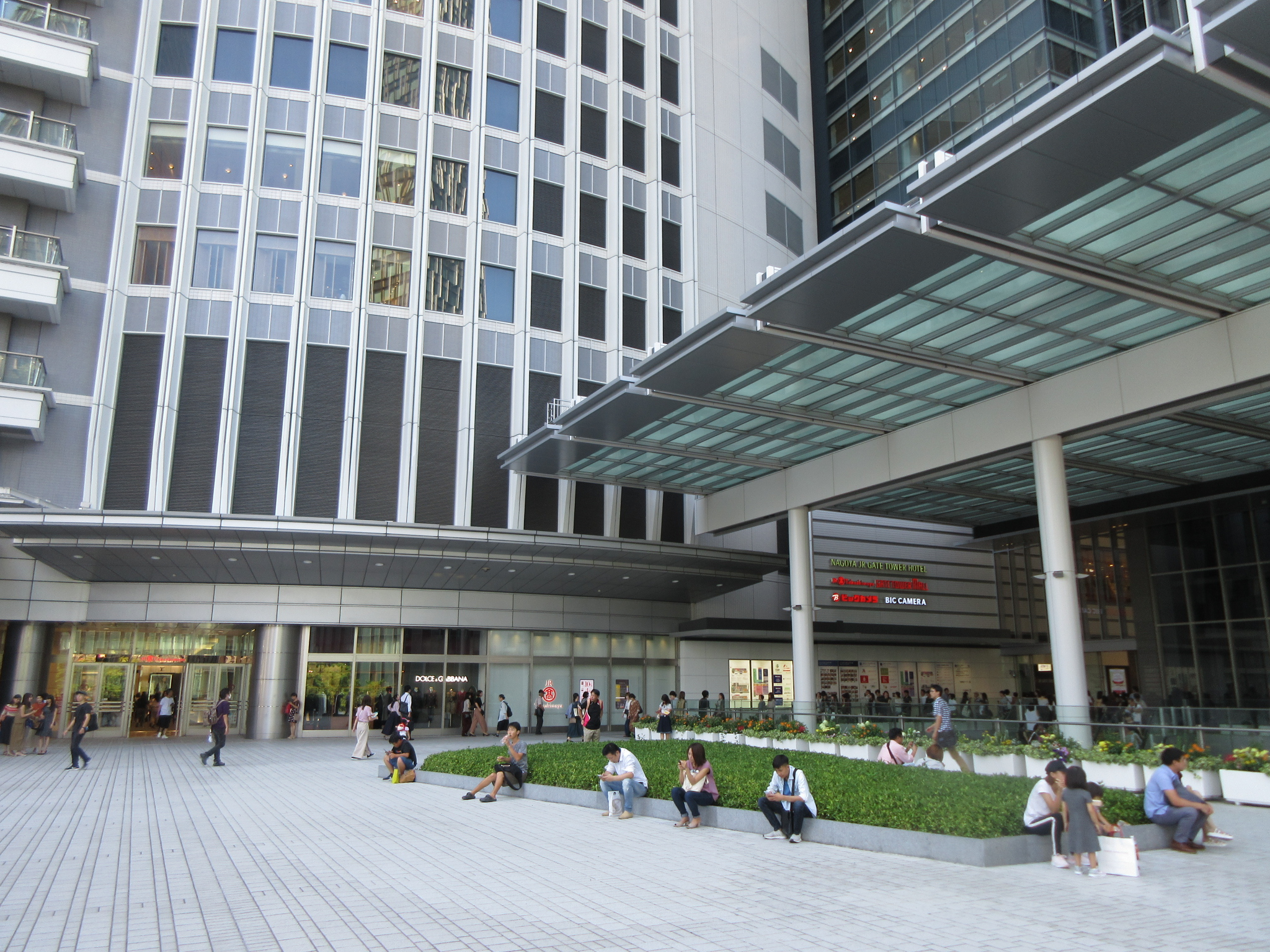 JRセントラルタワーズの３階入口